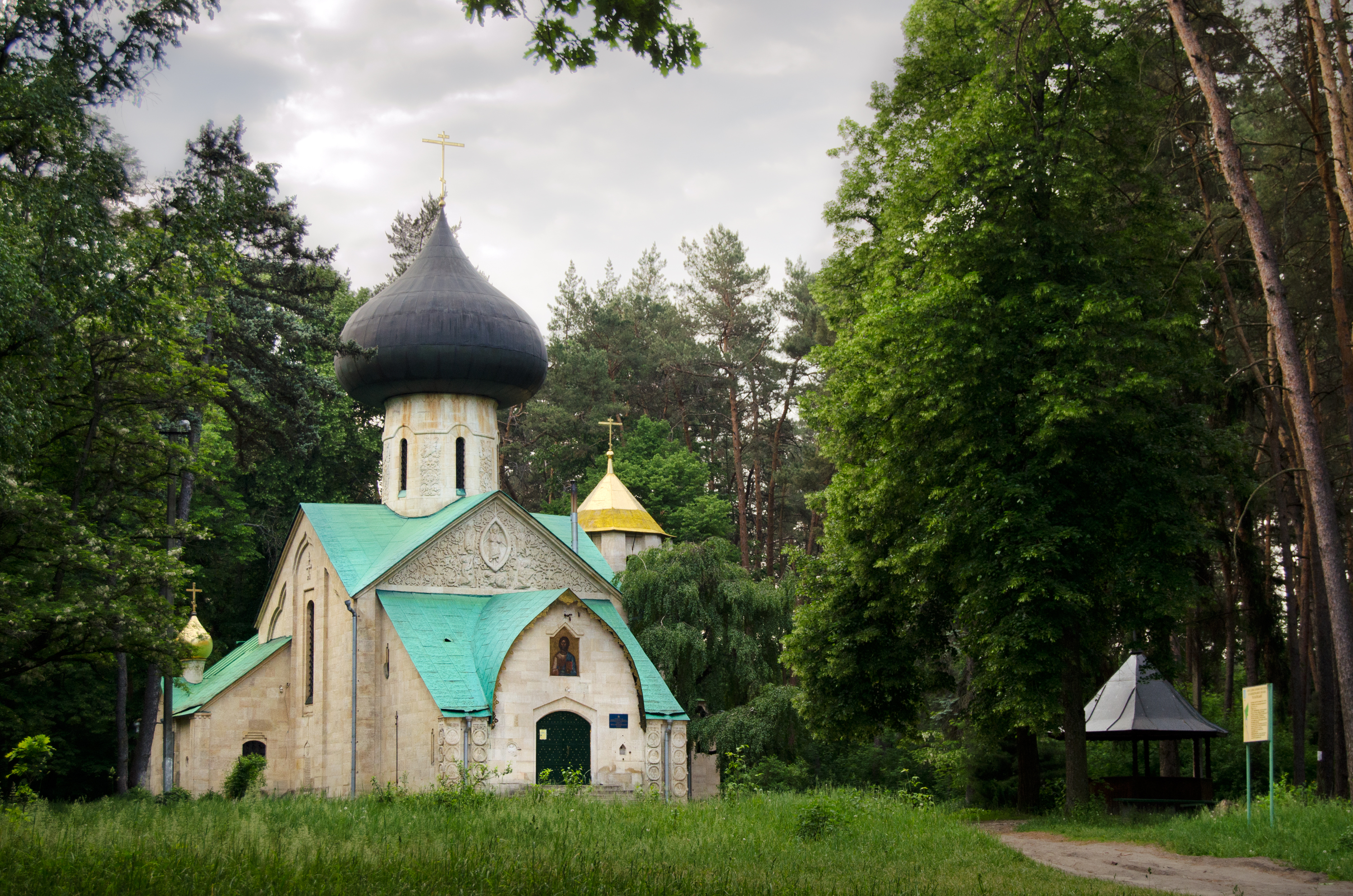 Церковь Спаса Преображения (Спроектирована А. Щусевым, дата постройки между 1911 и 1913 гг). Усадьба Натальевка, посёлок Владимировка, Мурафский сельский совет, Краснокутский район, Харьковская область.